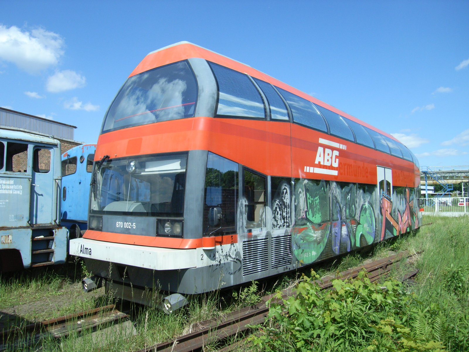 Doppelstockschienenbus der DWE Baureihe 670(Alma).